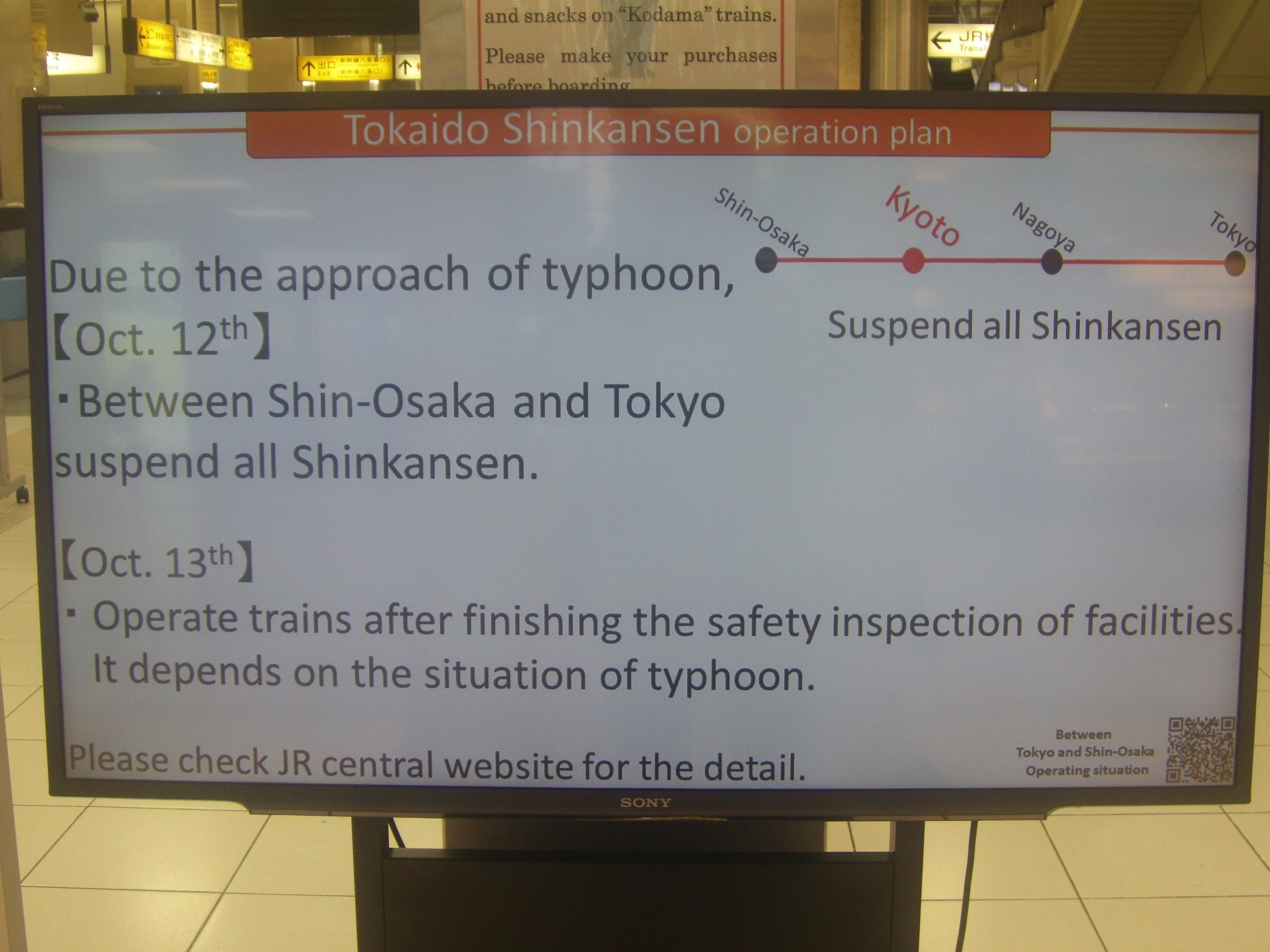 令和元年10月12日に日本列島を襲った台風19号による東海道新幹線の計画運休告知